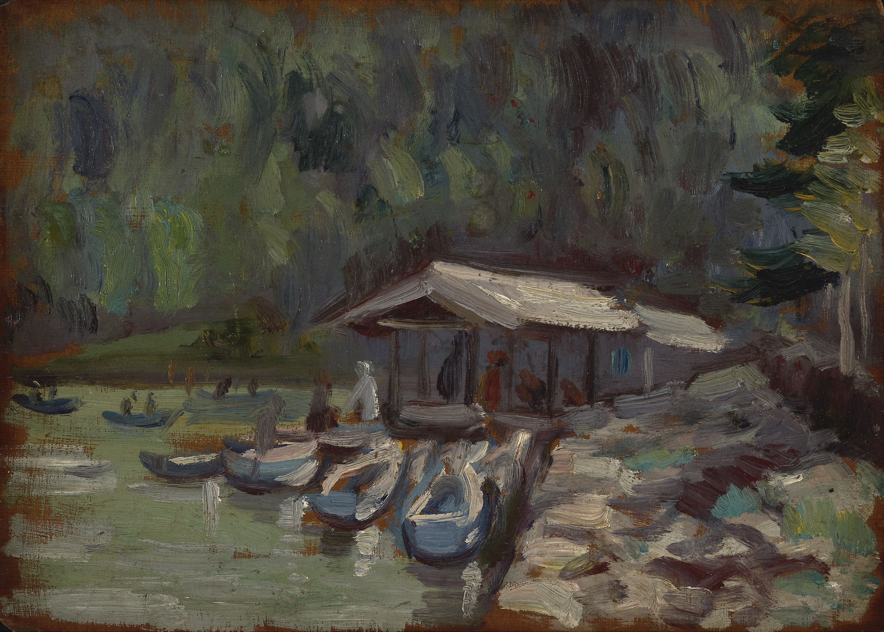 中文（台灣）: 李梅樹作品：岸邊小屋，年份不詳，油彩，木板。小河邊的小船屋和小船靜靜地排列。